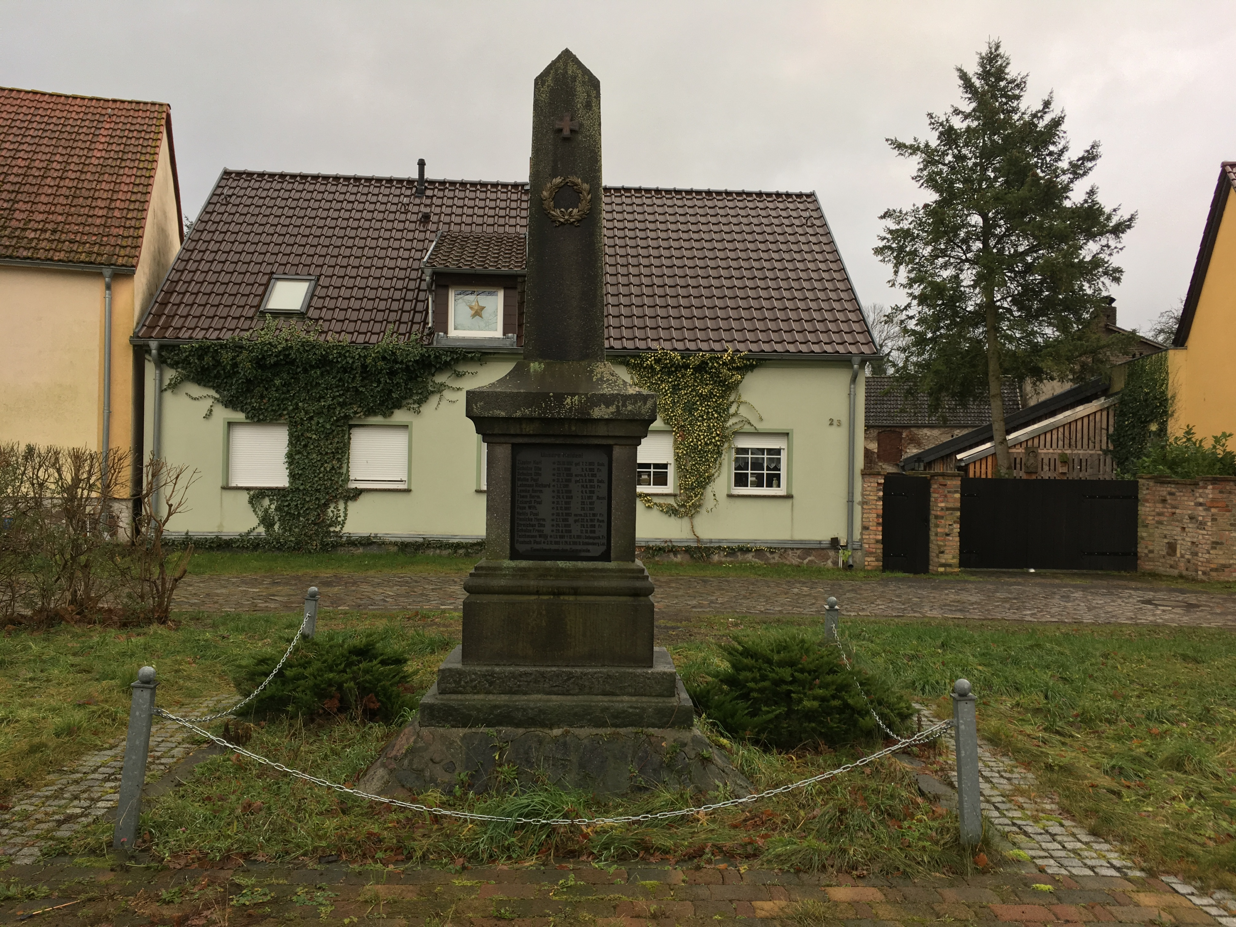 Denkmal für die Gefallenen aus dem Ersten Weltkrieg auf dem Dorfanger in Klein Besten, Gemeinde Bestensee in Brandenburg